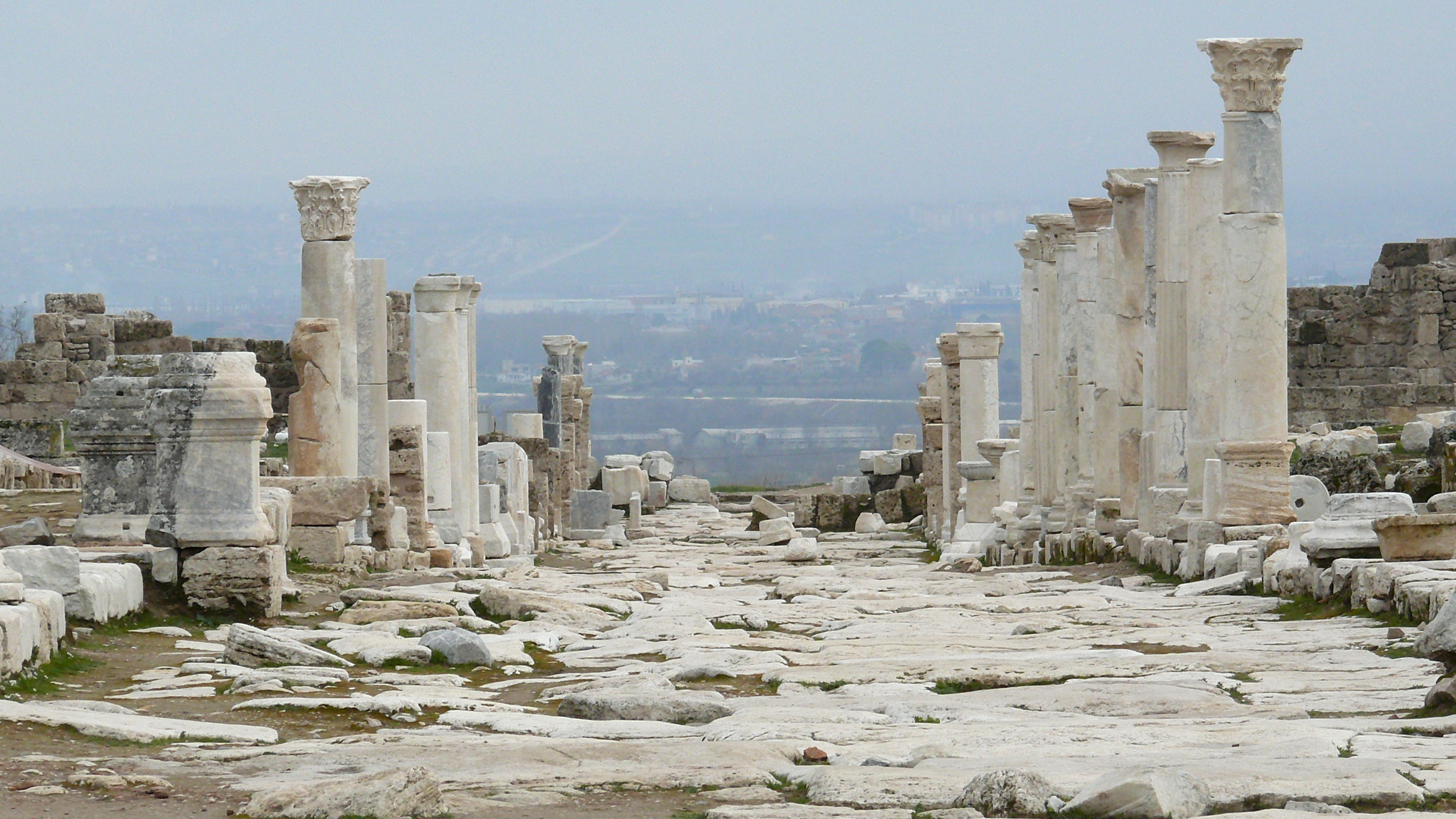 Säulenreihen an der Straße quer durch Laodikeia